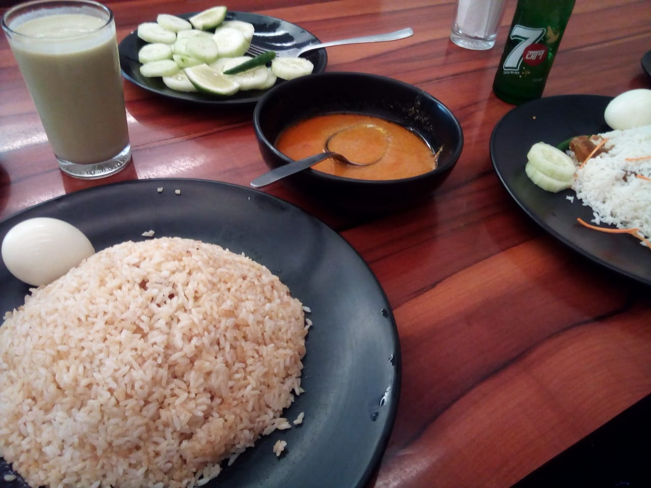 I clicked this picture at restaurant named "Sarinda" from Mymensingh, Bangladesh. :)